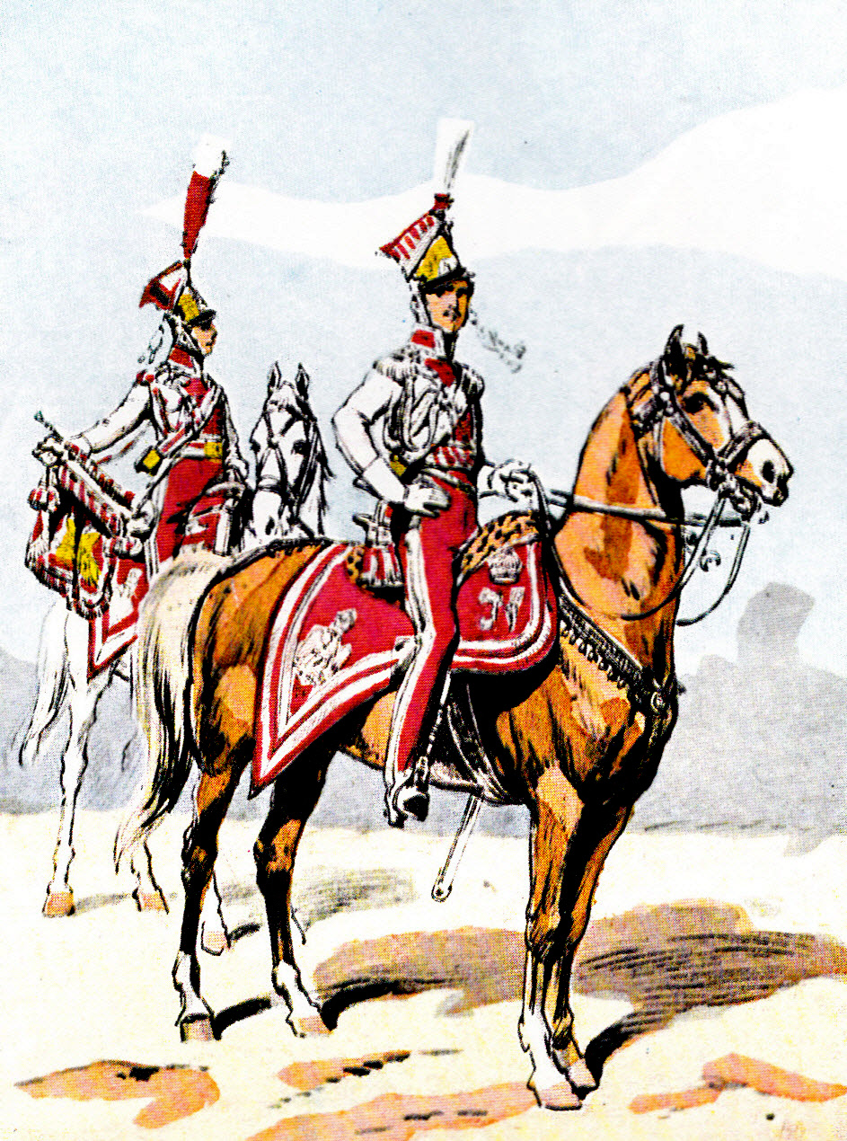 Officier en grande tenue spéciale et trompette en grande tenue du 1er régiment de chevau-légers lanciers polonais de la Garde impériale.